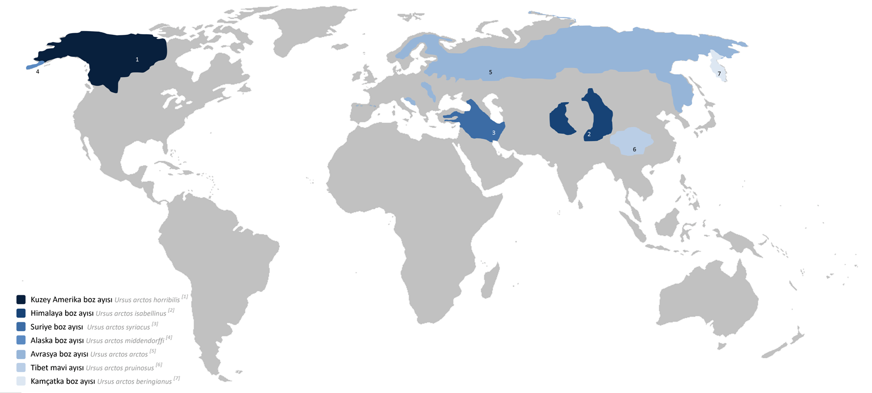 Boz ayı dağılış haritası.